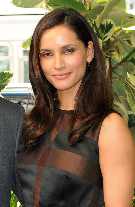 Leonor Varela Palma (n. Santiago, Chile, 29 de diciembre de 1972) es una actriz y modelo chilena, que ha participado en diversas producciones cinematográficas norteamericanas, latinoamericanas y europeas,y ha sido rostro de múltiples campañas publicitarias